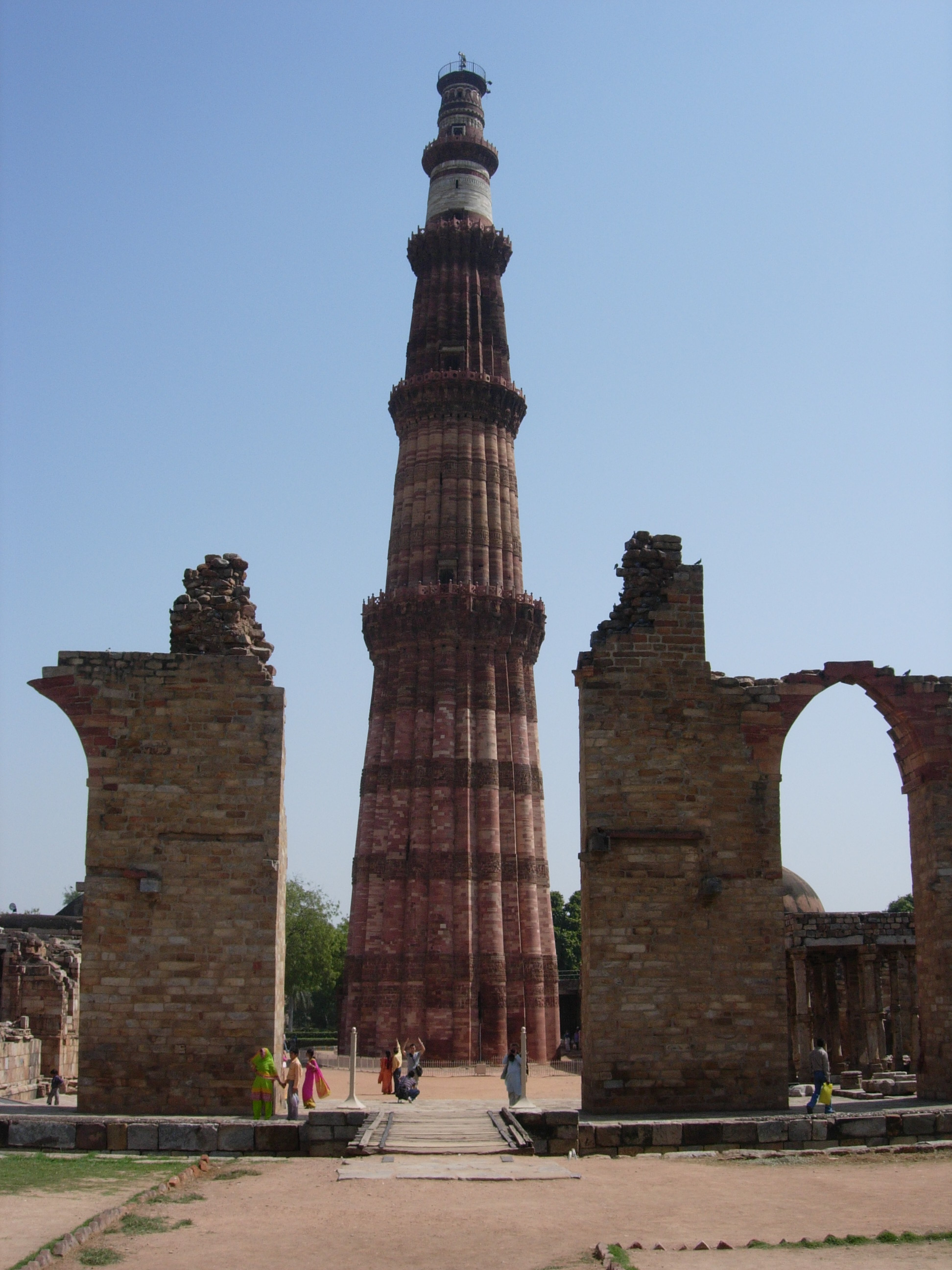 Qutub Minar